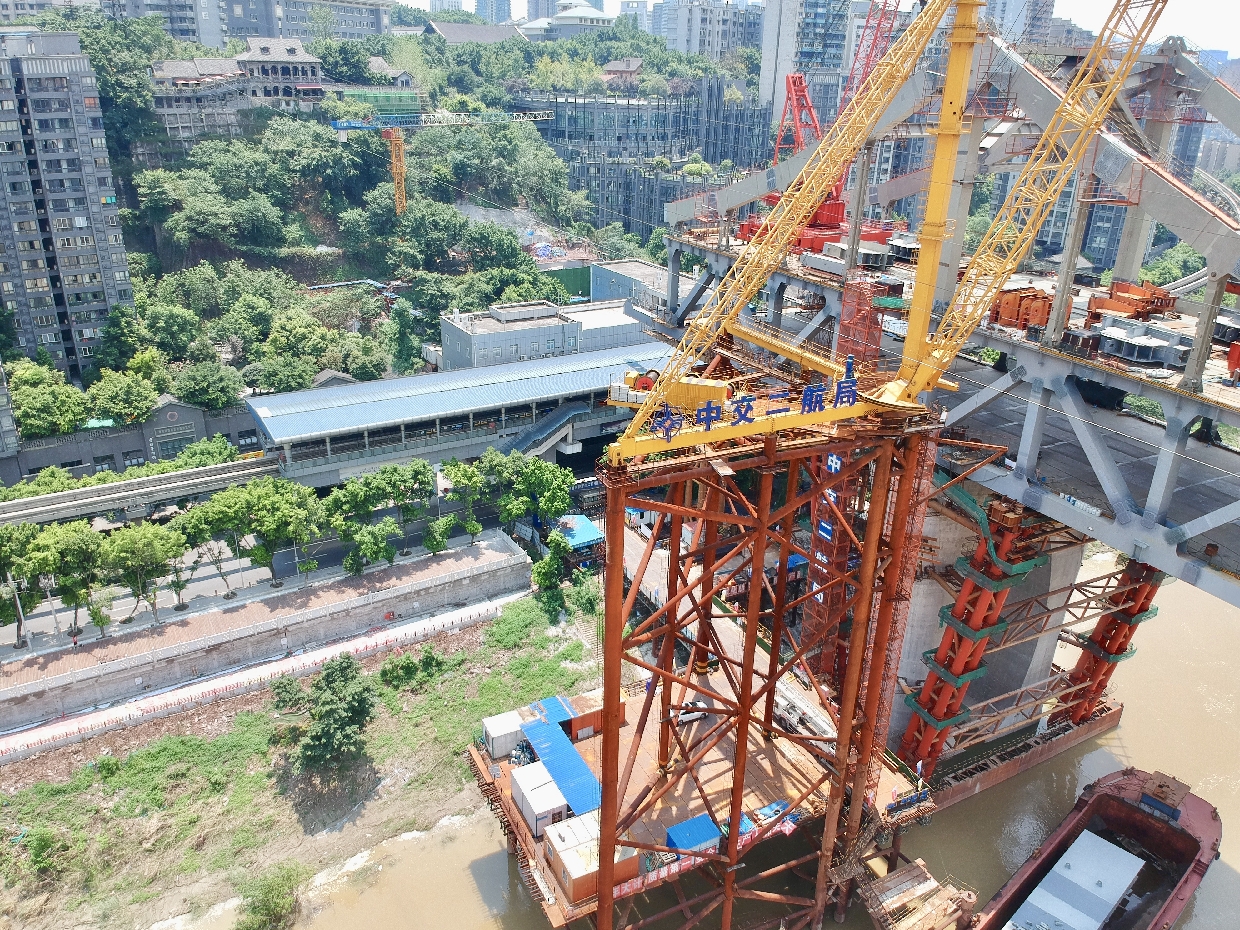 中文（中国大陆）: 正在建设的曾家岩嘉陵江大桥与 2 号线曾家岩站